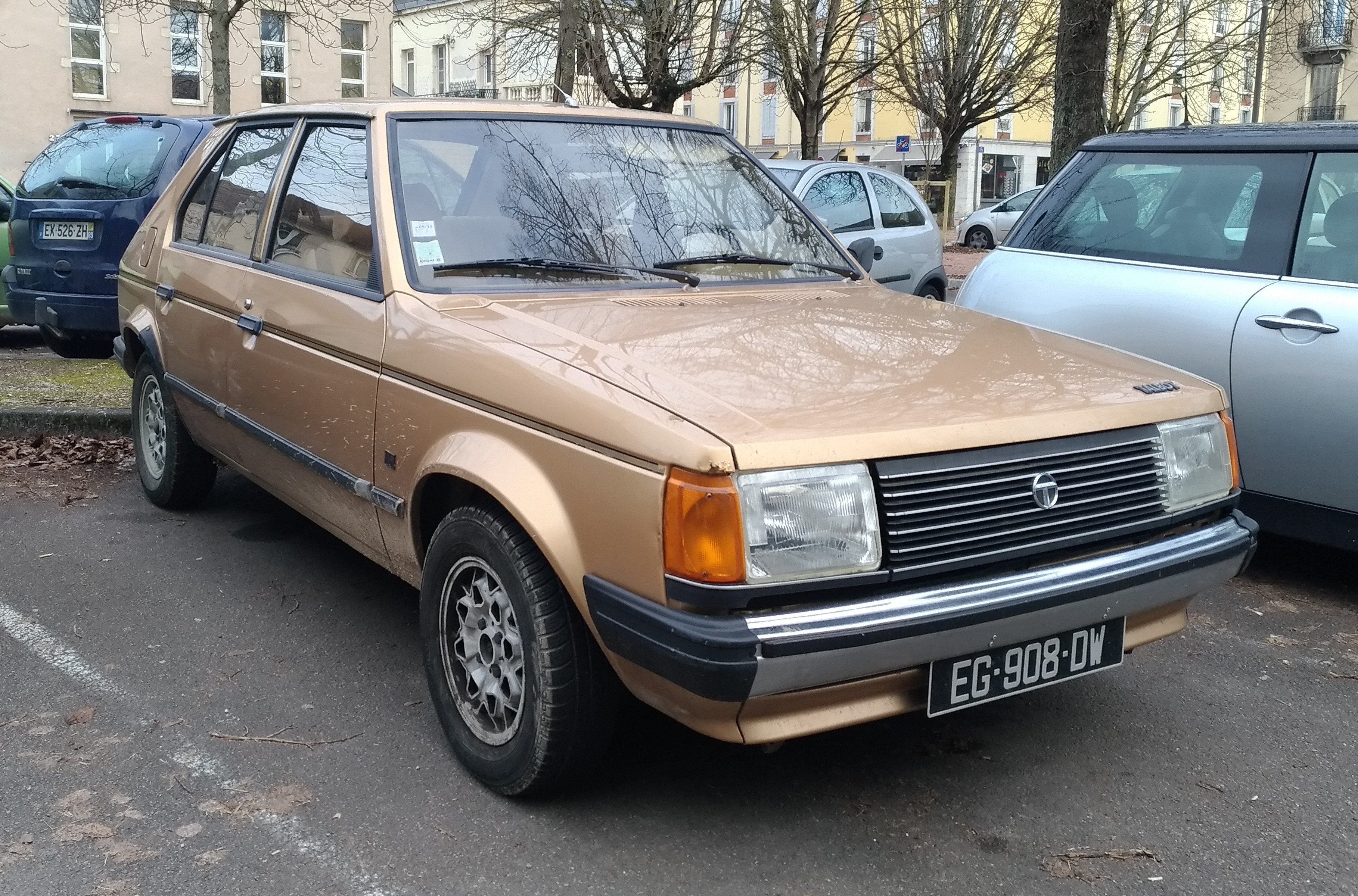 1982 Talbot Horizon (1.4 65hp) at Dijon